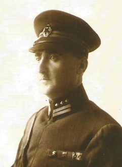 Tuğgeneral Ahmet Nuri Diriker, 1920'ler